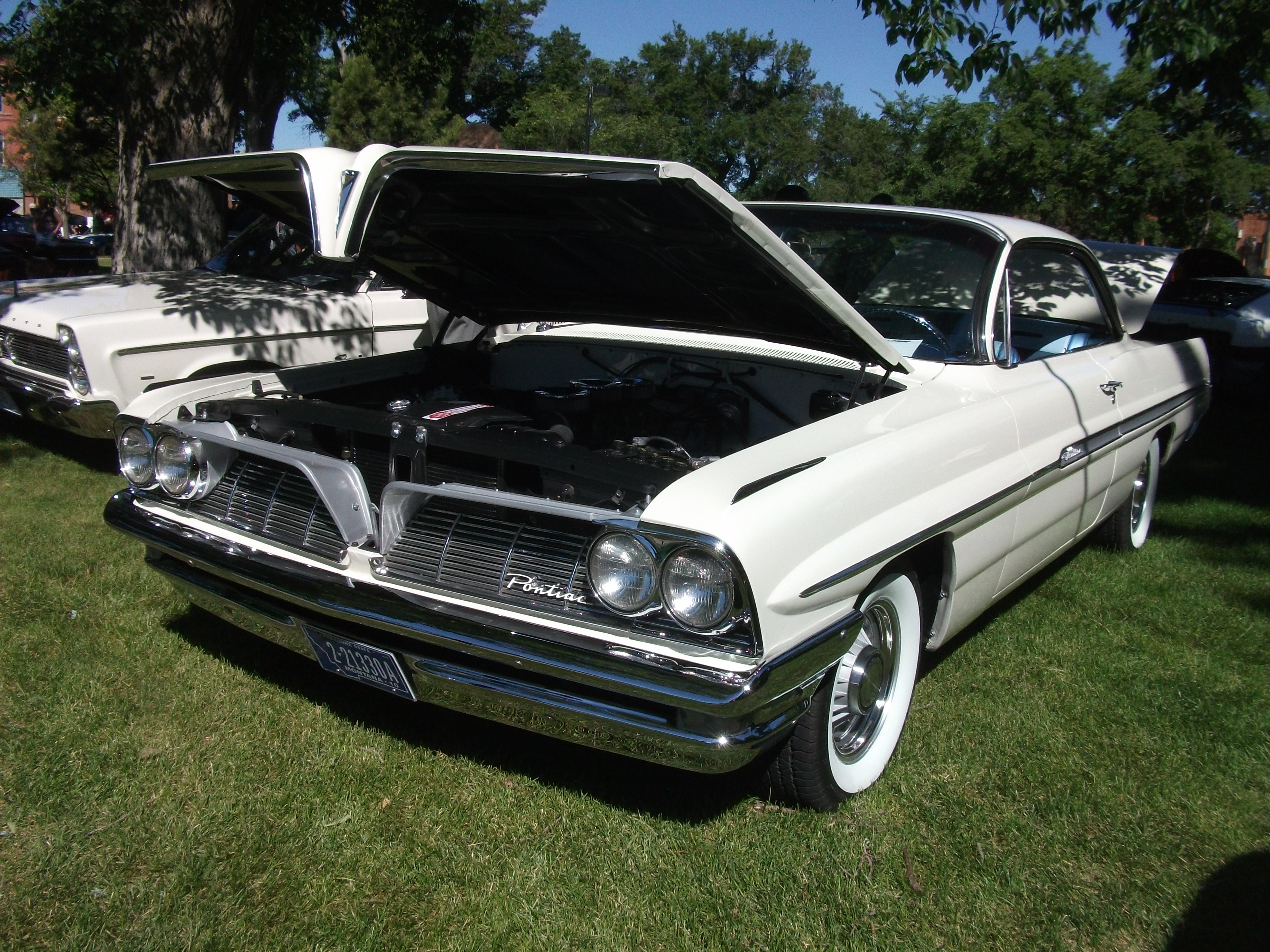 1961 Pontiac Ventura Sports Coupe